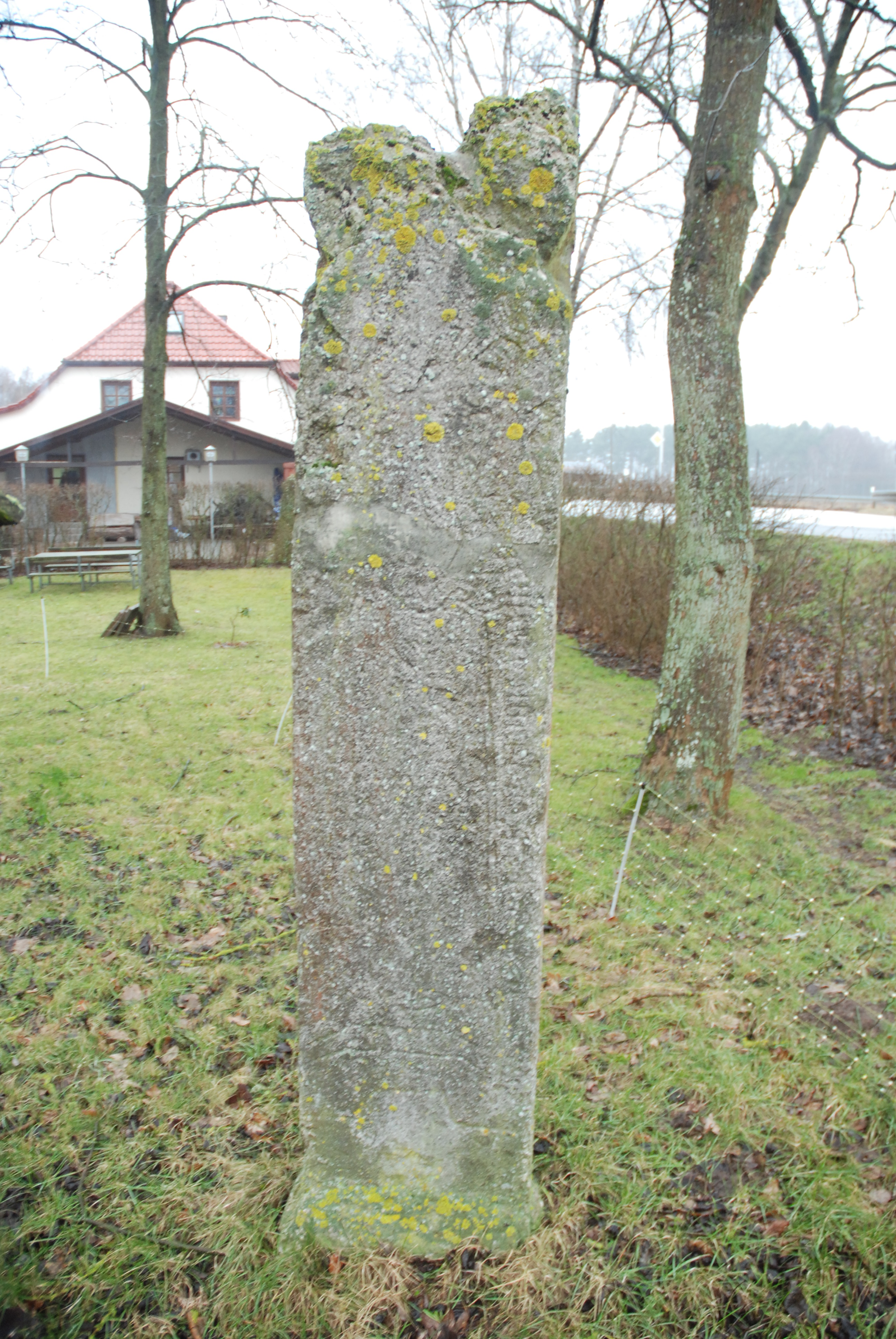 Sühnestein an einem Gasthof an der B 105 bei Tramm (Gemeinde Roggenstorf), jedoch auf dem Gemeindegebiet von Papenhusen, Landkreis Nordwestmecklenburg